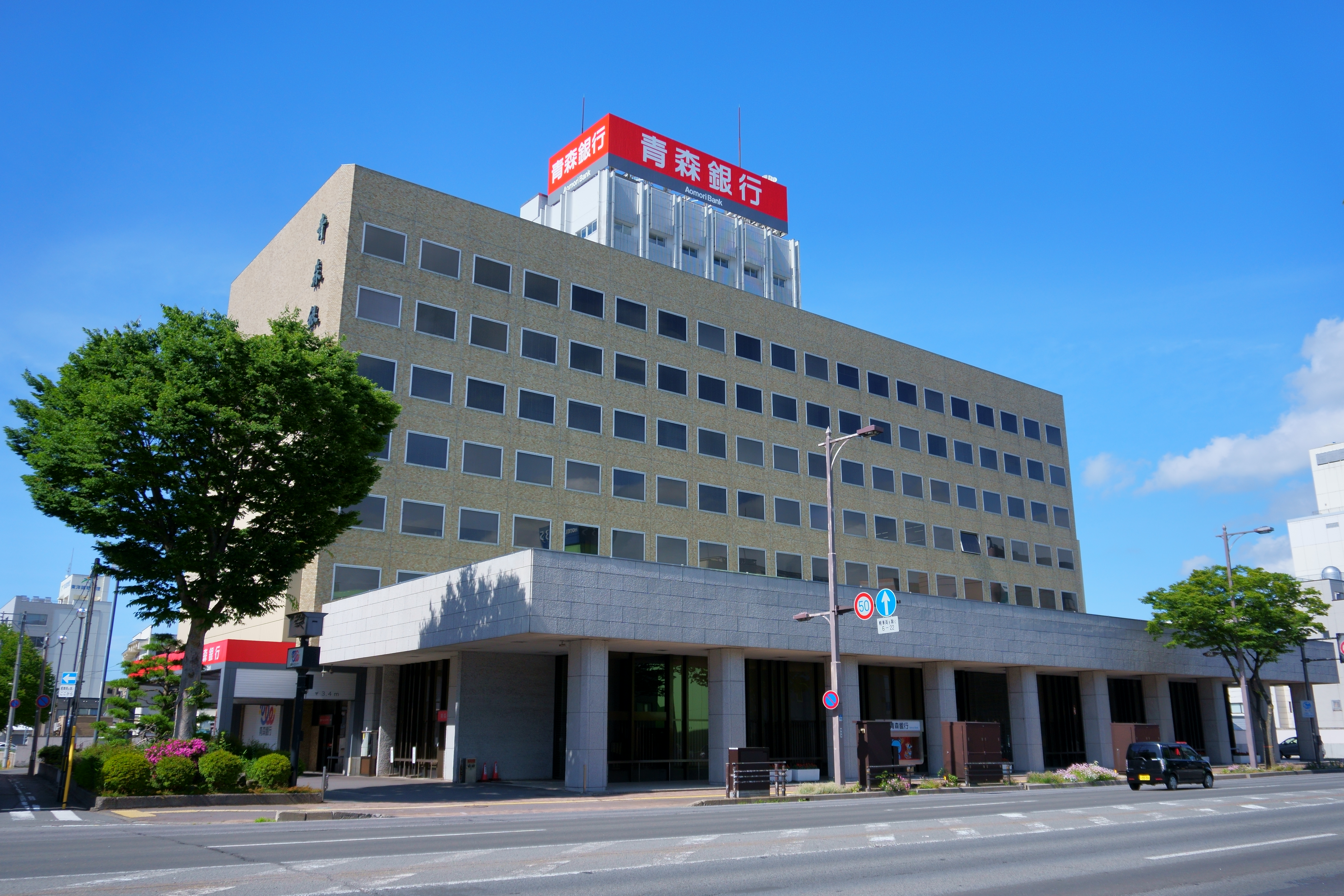 青森銀行本店営業部